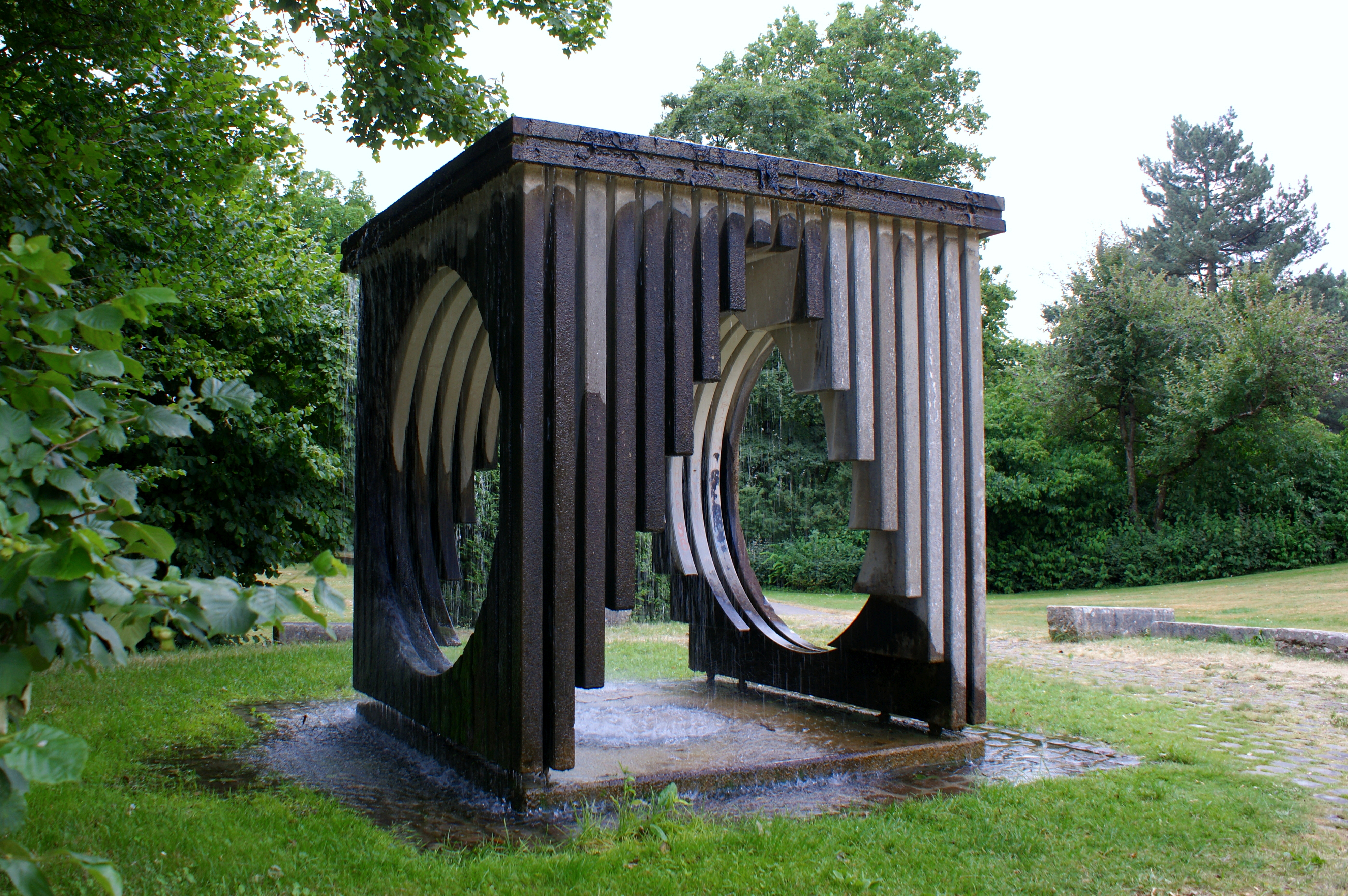 Marabut